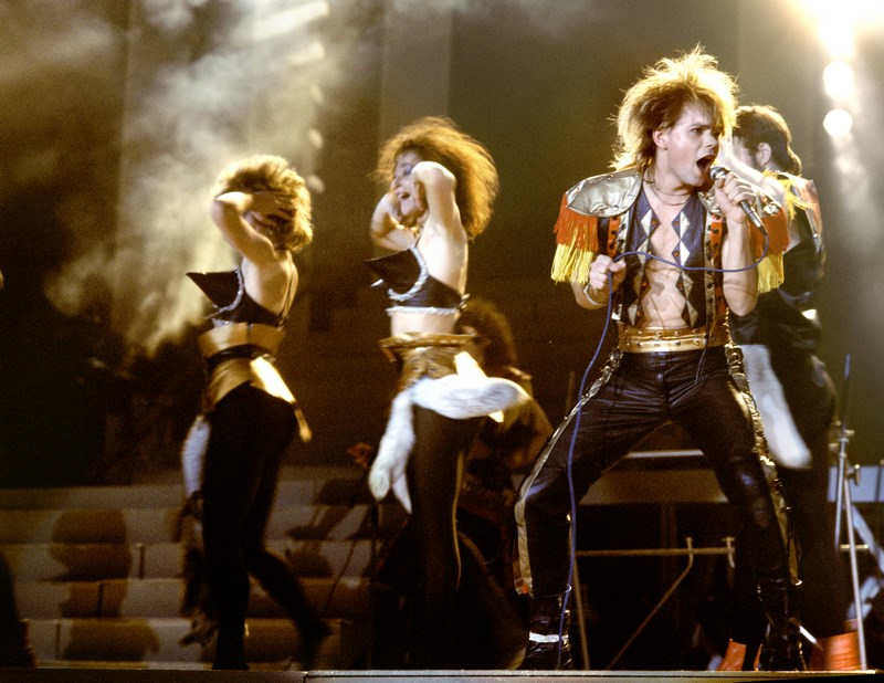 На-На 1989 год